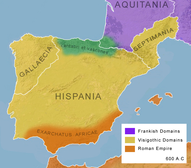 Mapa dos dominios visigodos ―España, Galiza e Septimania― contra o ano 600.